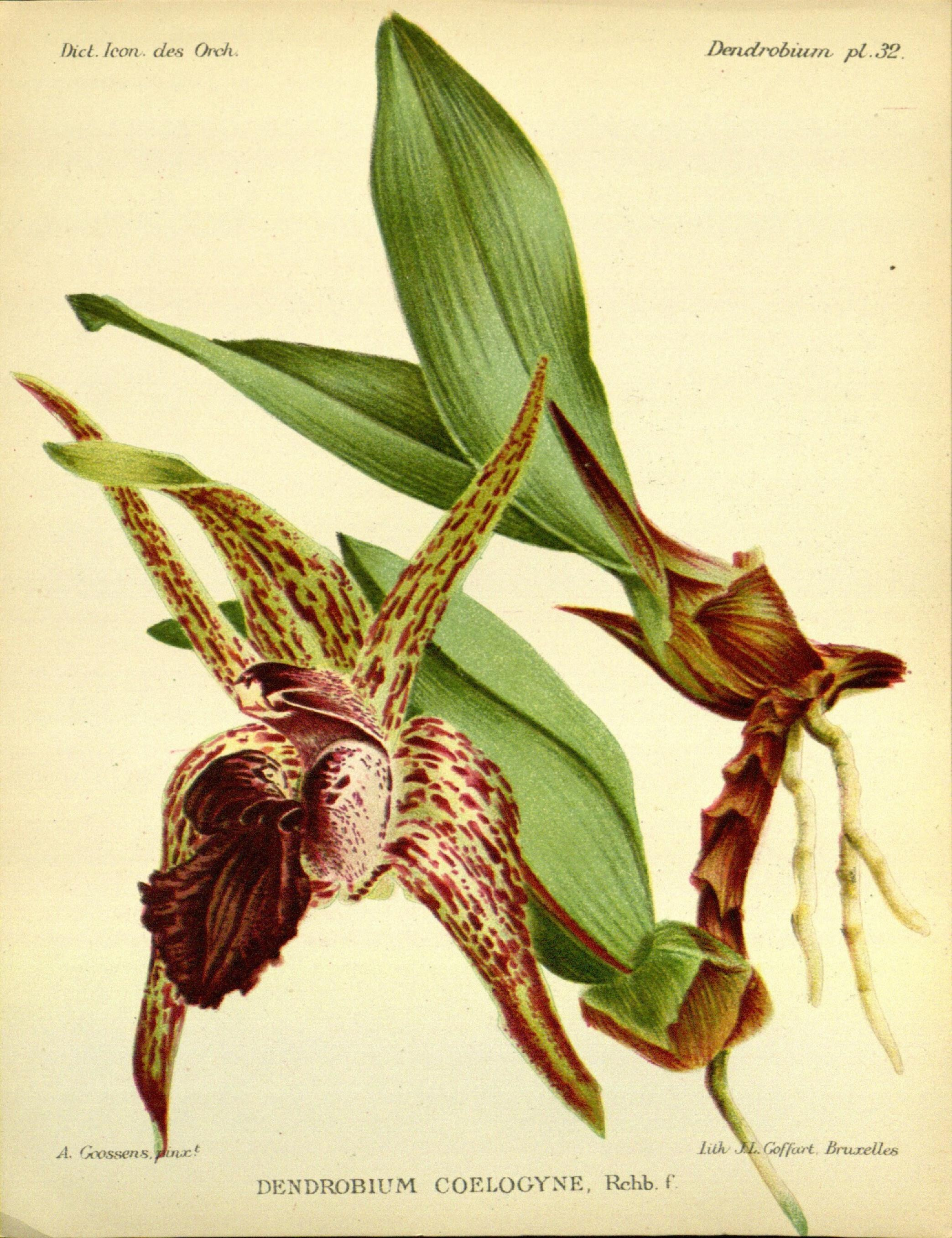 Dictionnaire iconographique des orchidees :. Bruxelles :Imp. F. Havermans, 1896-1907..